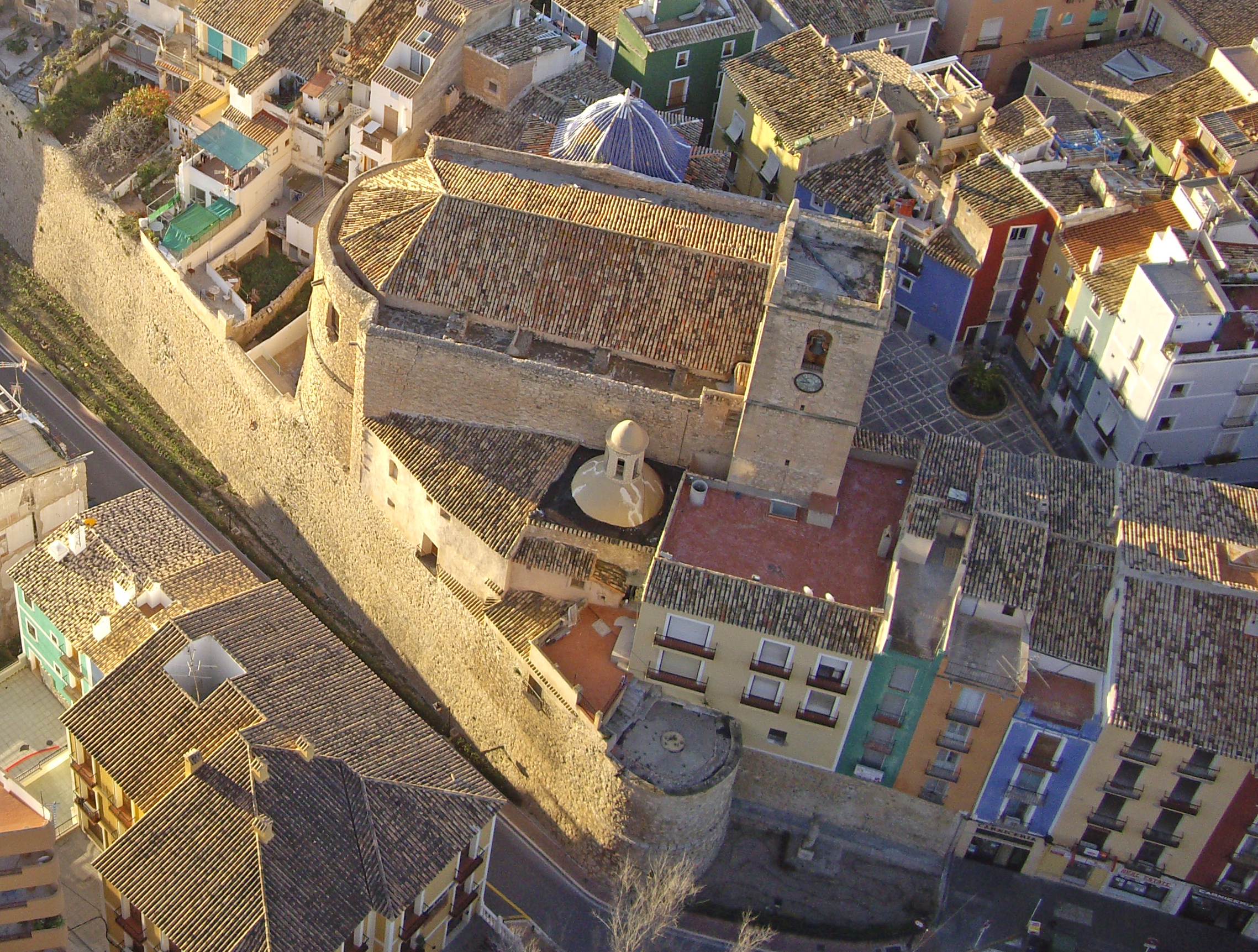 Vista aérea de la Iglesia de la Asunción de Villajoyosa